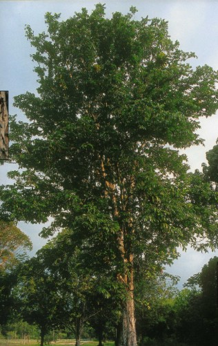 andiroba adulta amazônica